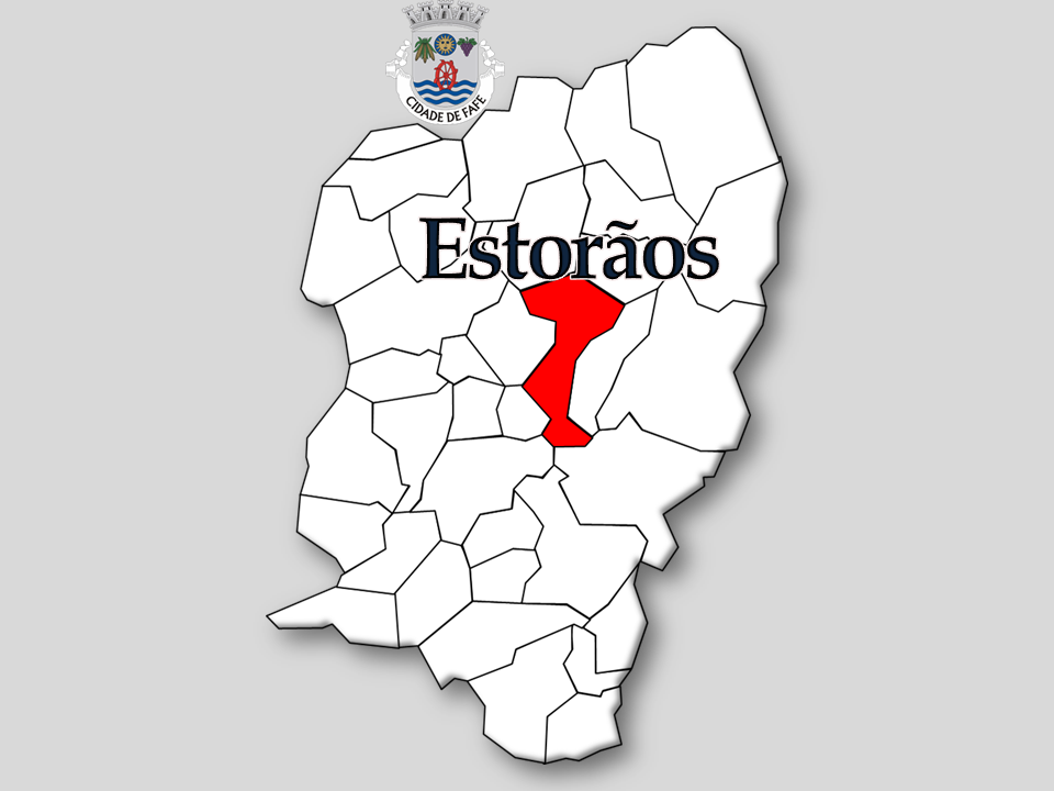 Censos 1864/2011